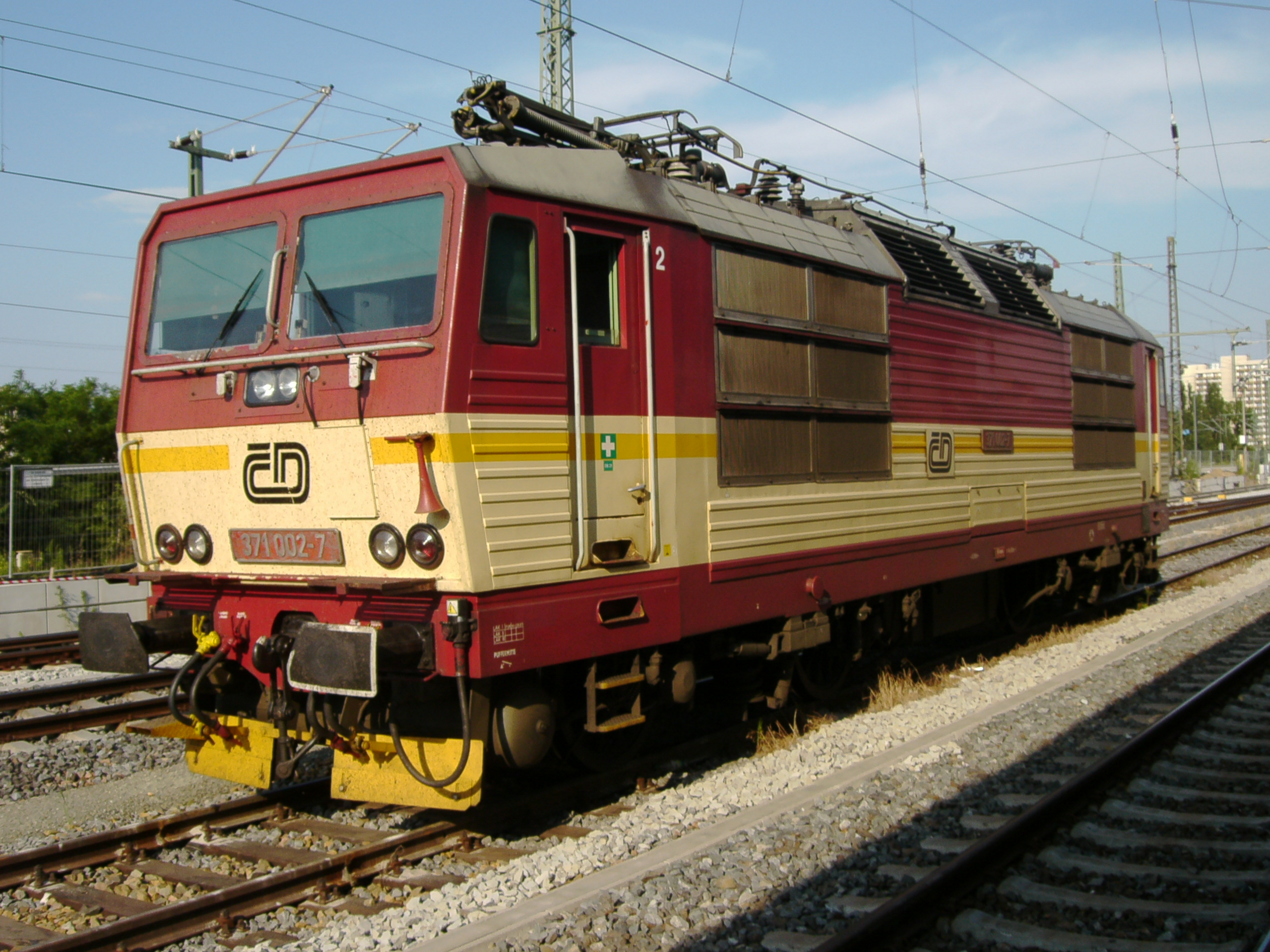 Zweisystemlok ČD 371 002 der Tschechischen Bahn im Dresdner Hauptbahnhof